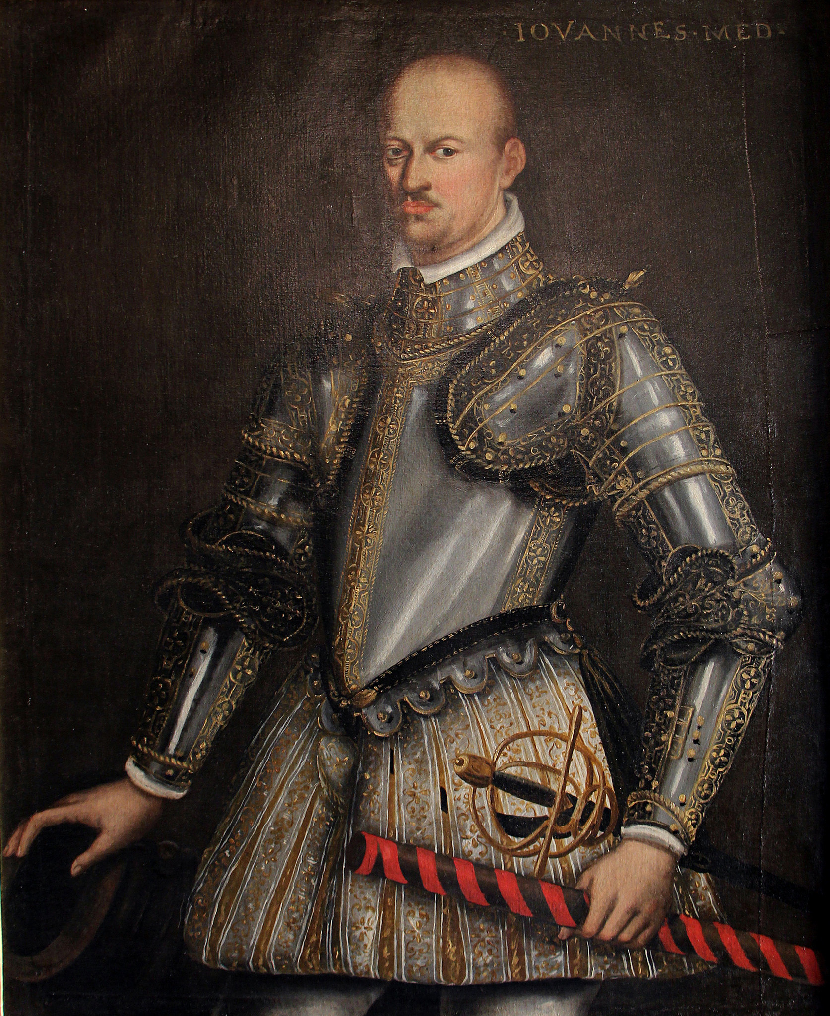 Портрет незаконнорожденного сына Козимо I, дона Джованни Медичи (1567 - 1621)